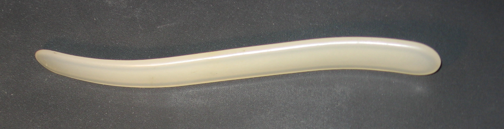 szpatułka lekarska z tworzywa sztucznego, długość 16 cm